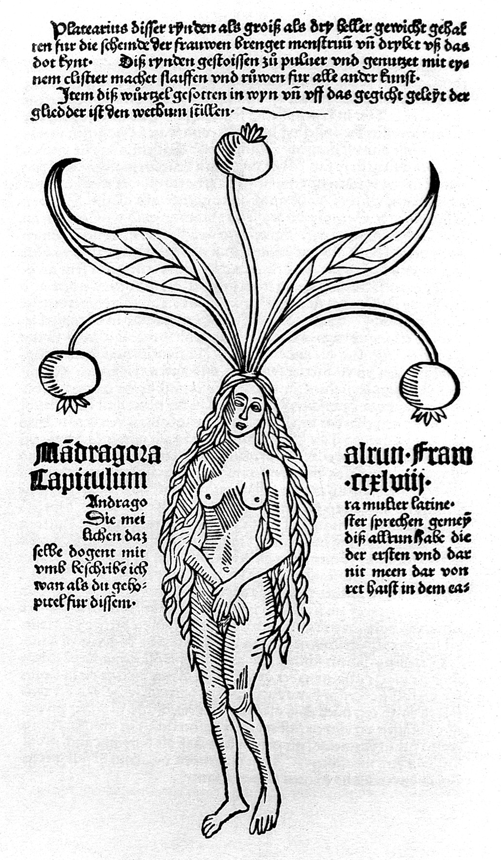 Hortus Sanitatis: mandrake. Rare Books